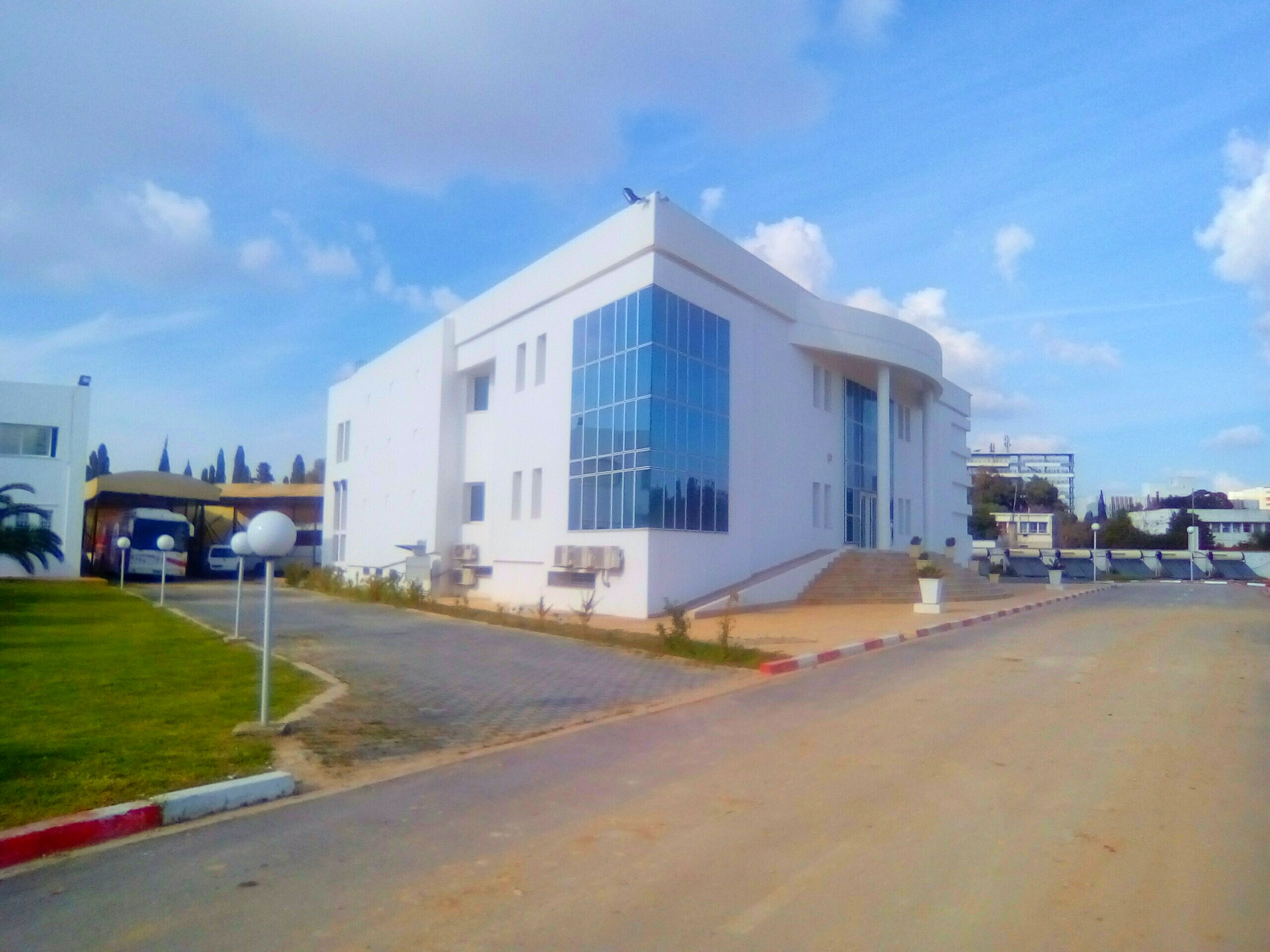 إدارة التحكيم بتونس